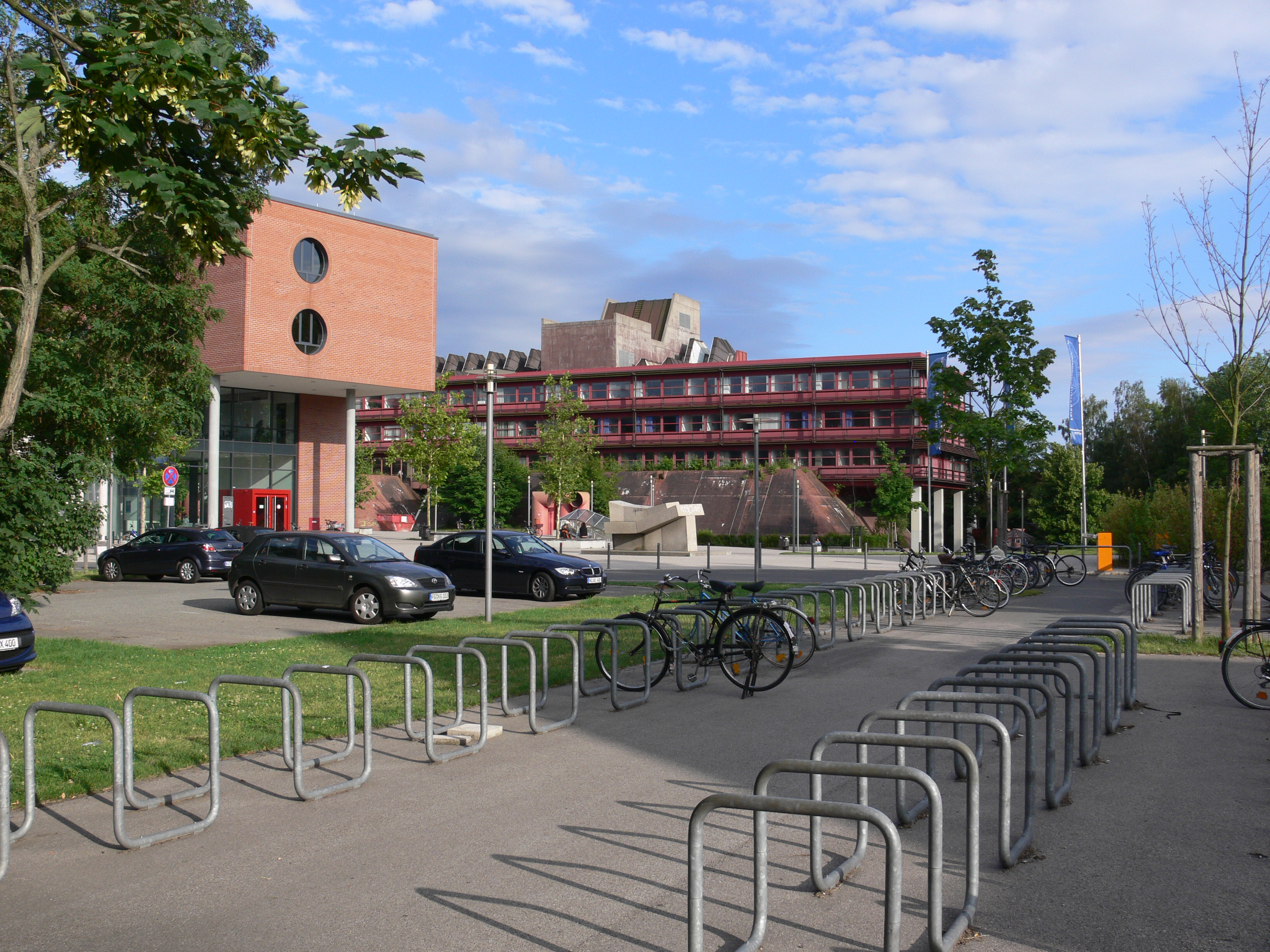 Nürnberg, Universitätscampus, Ansicht von der Maxtormauer